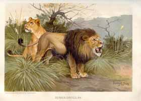 Berber-oroszlán, Brehm az állatok világa c. művéből. Vastagh Géza műve.